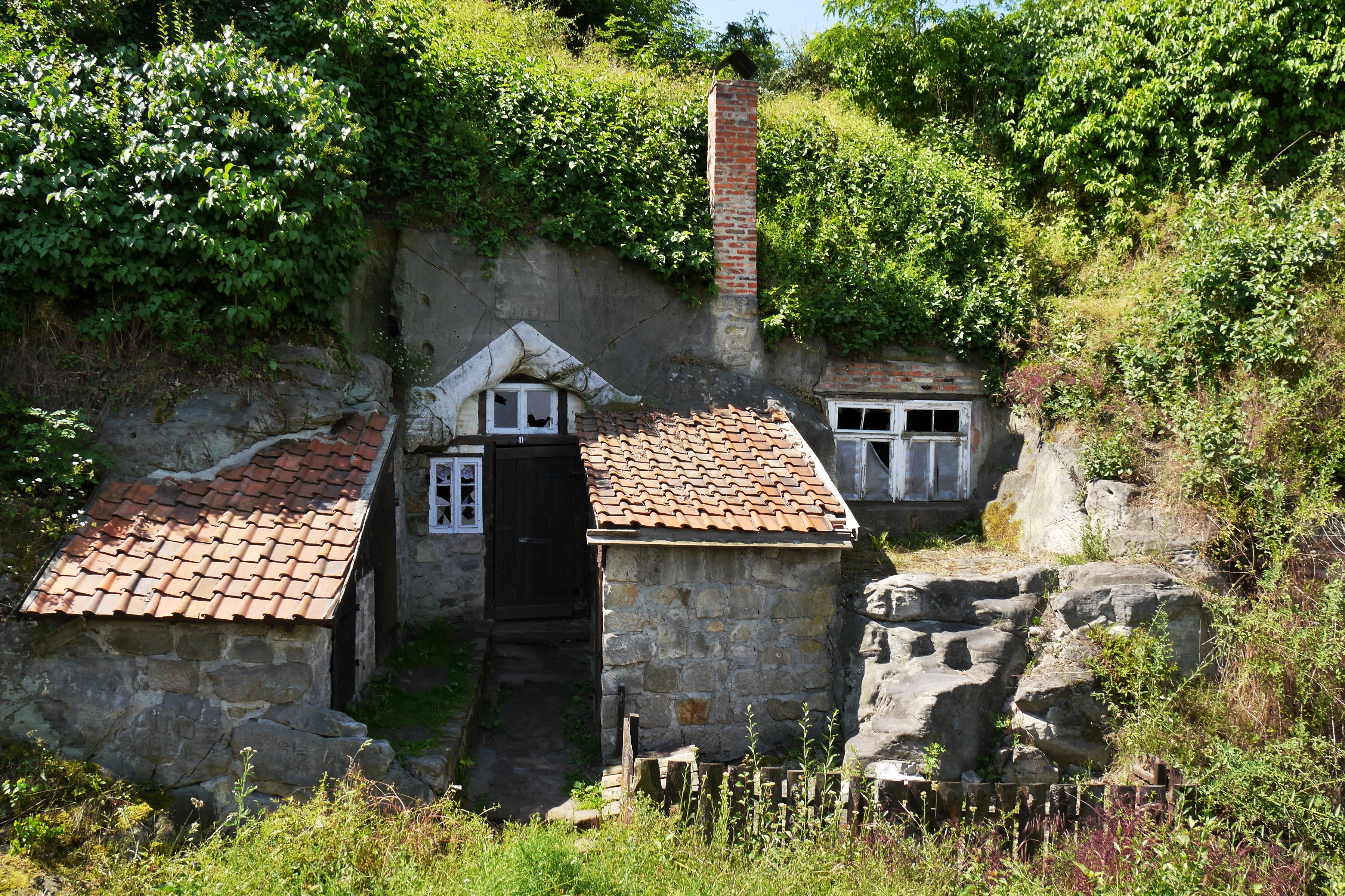 Ansicht einer Höhlenwohnung in Langenstein, südwestlich von Halberstadt